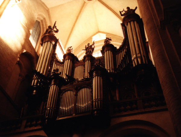 Je suis l'auteur. Io sono l'autore. I took this photo.